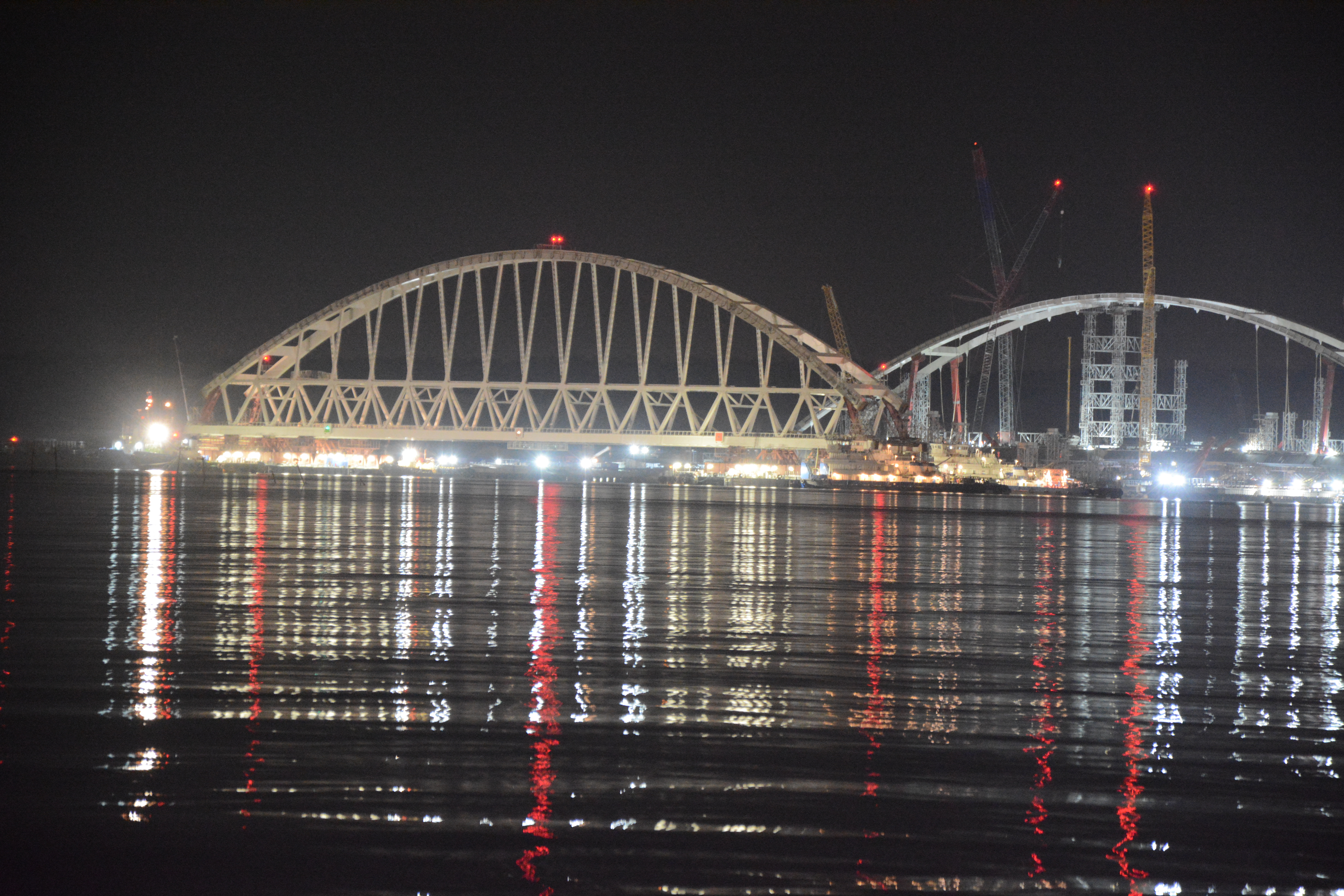 Морская операция по транспортировке железнодорожной арки. Начало транспортировки к месту установки.